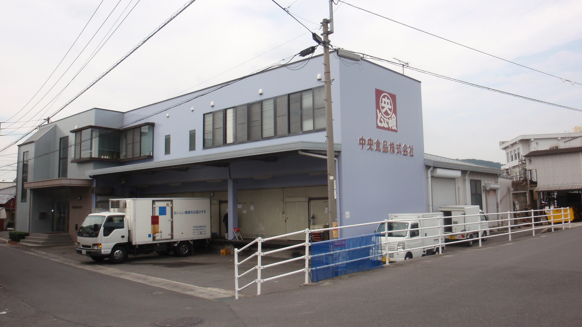 香川県高松市にある中央食品本社及び工場。